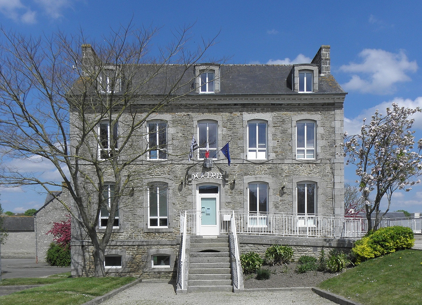 Mairie de Plumaudan (22).